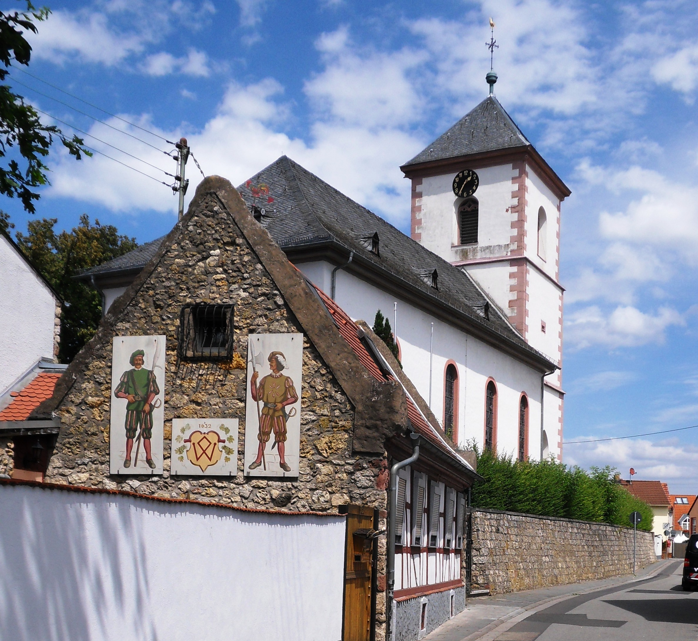 Blick von der Kirchstraße nach Norden zur Dorfkirche in Wicker